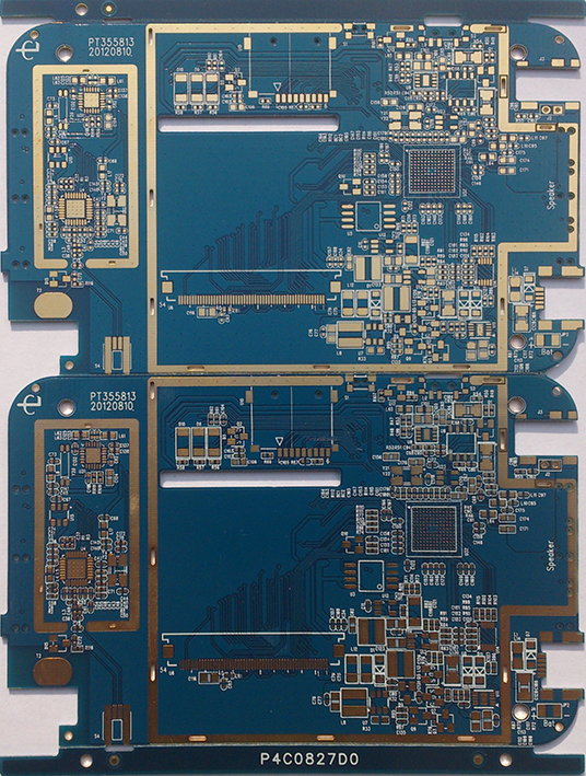 برد مدار چاپی مالتی لایر - 4 لایه - آبکاری طلا تولید شده توسط عرش گستر